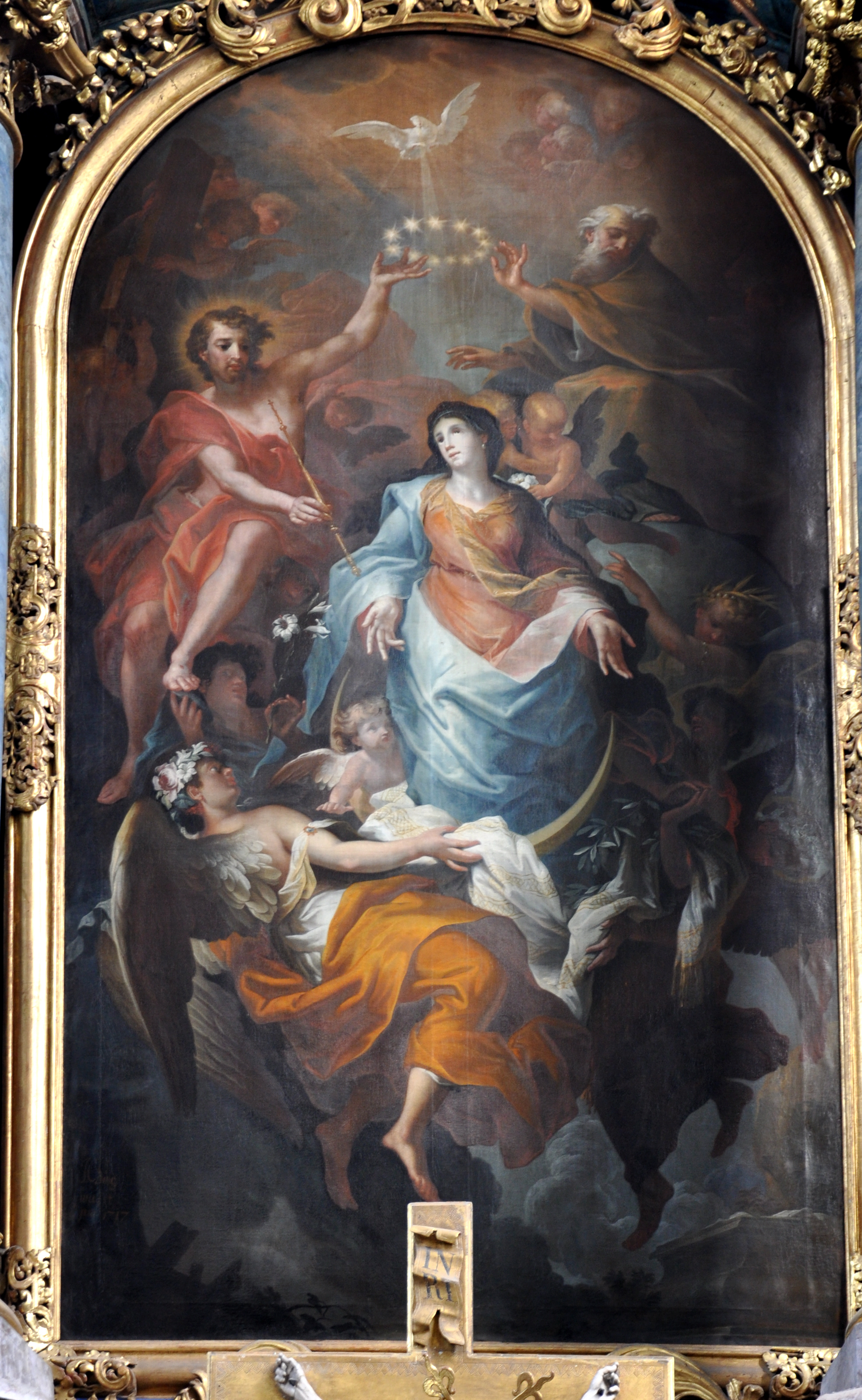 Bad Schussenried, Pfarrkirche St. Magnus (ehemalige Klosterkirche)Hochaltar von 1718, Altarblatt "Marienkrönung" von Johann Caspar Sing (1717)